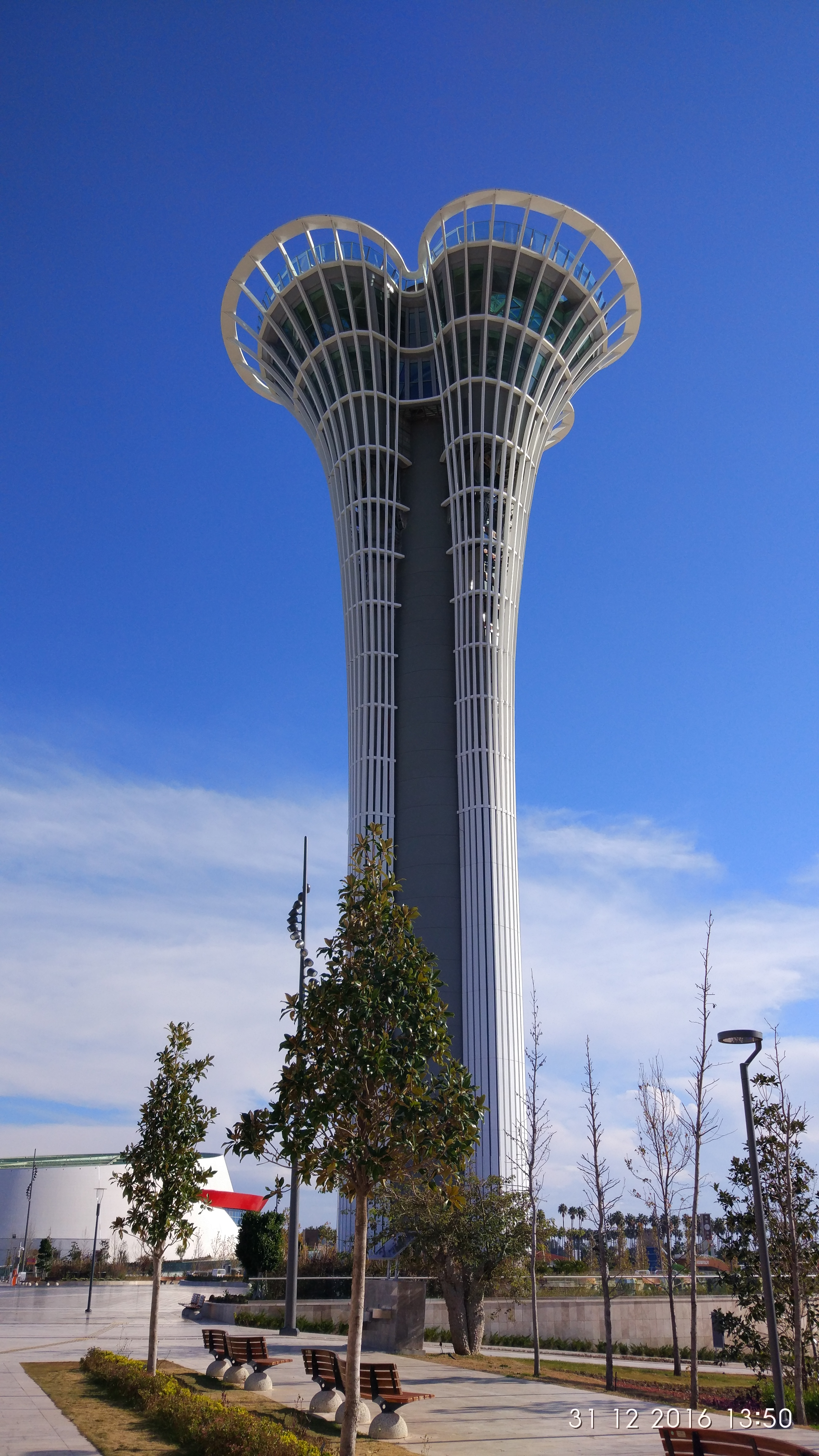 Expo Kulesi